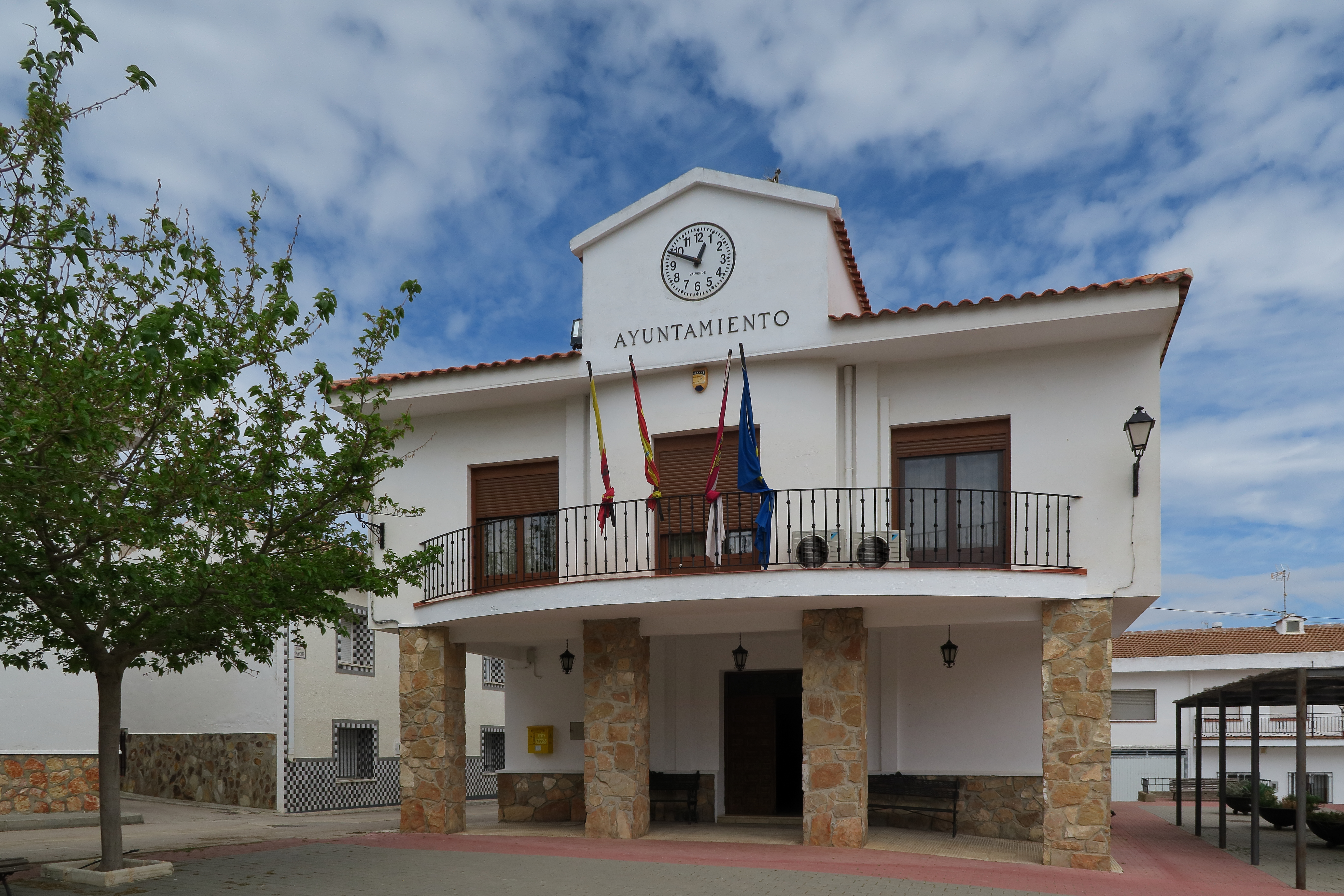 Montabo, Ayuntamiento